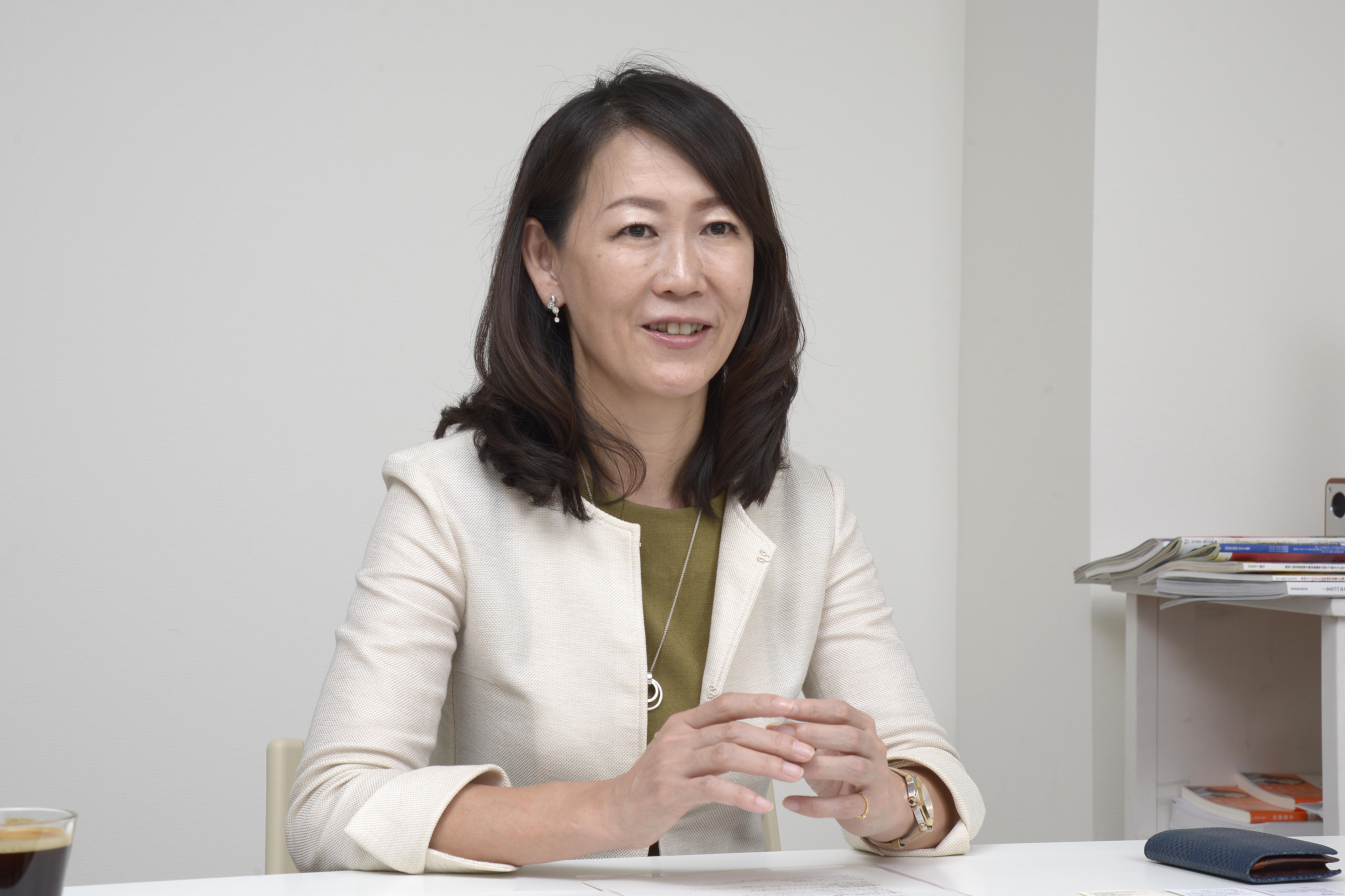 武藤頼胡最新版